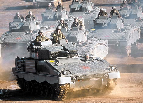 Pizarros del Regimiento de Infantería Mecanizada "Saboya" nº 6 de la Brigada de Infantería Mecanizada "Extremadura" XI maniobrando en un campo de maniobras.